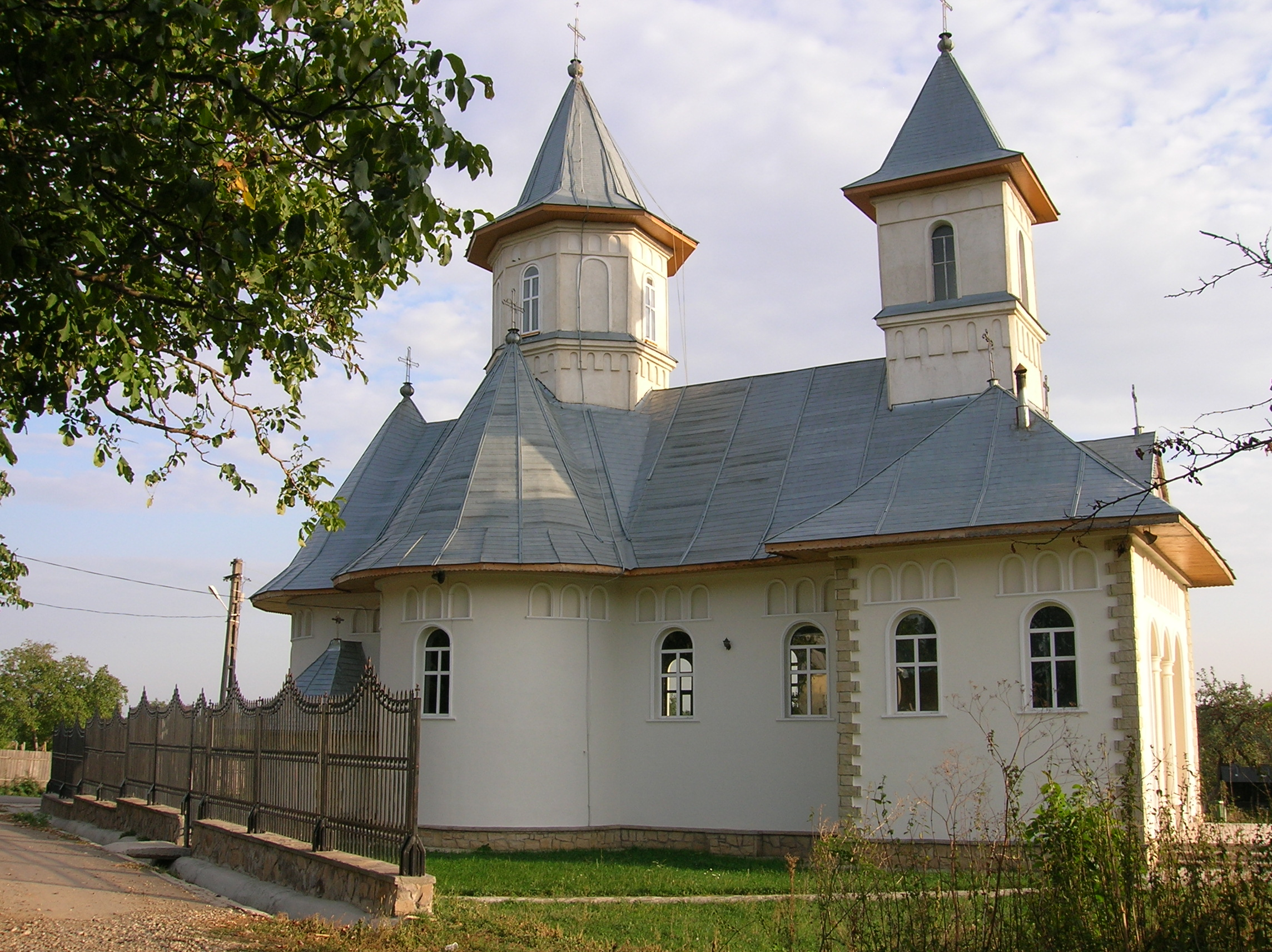 Comuna Valea Seacă Bacău - Satul Cucova - Biserica Adormirea Maicii Domnului